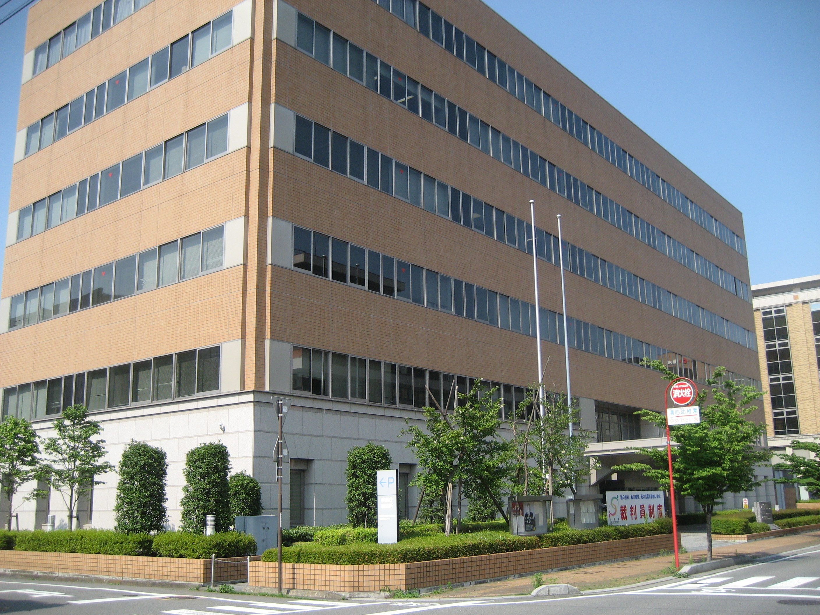 前橋地方検察庁庁舎